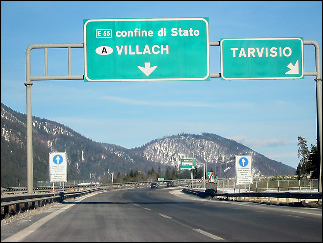 Route européenne 55 au niveau de Tarvisio en Italie